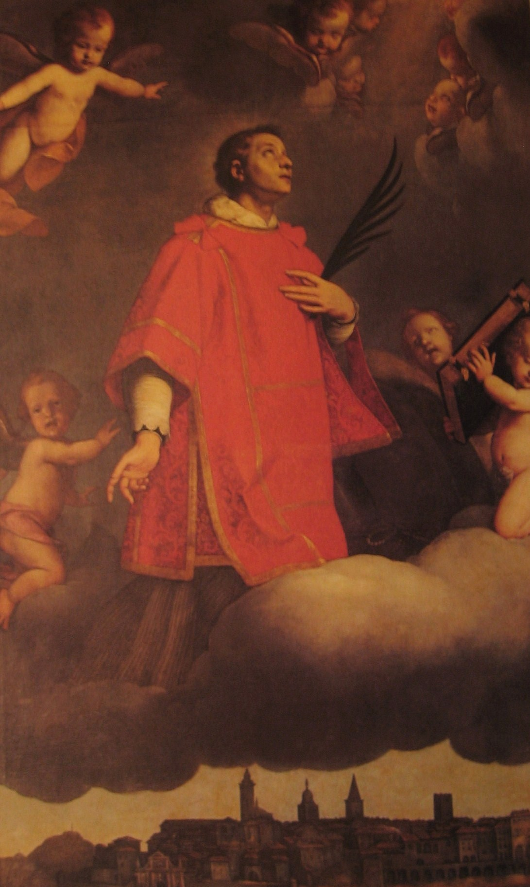 Carlo Ceresa, San Vincenzo in gloria, Duomo di Bergamo, Italy